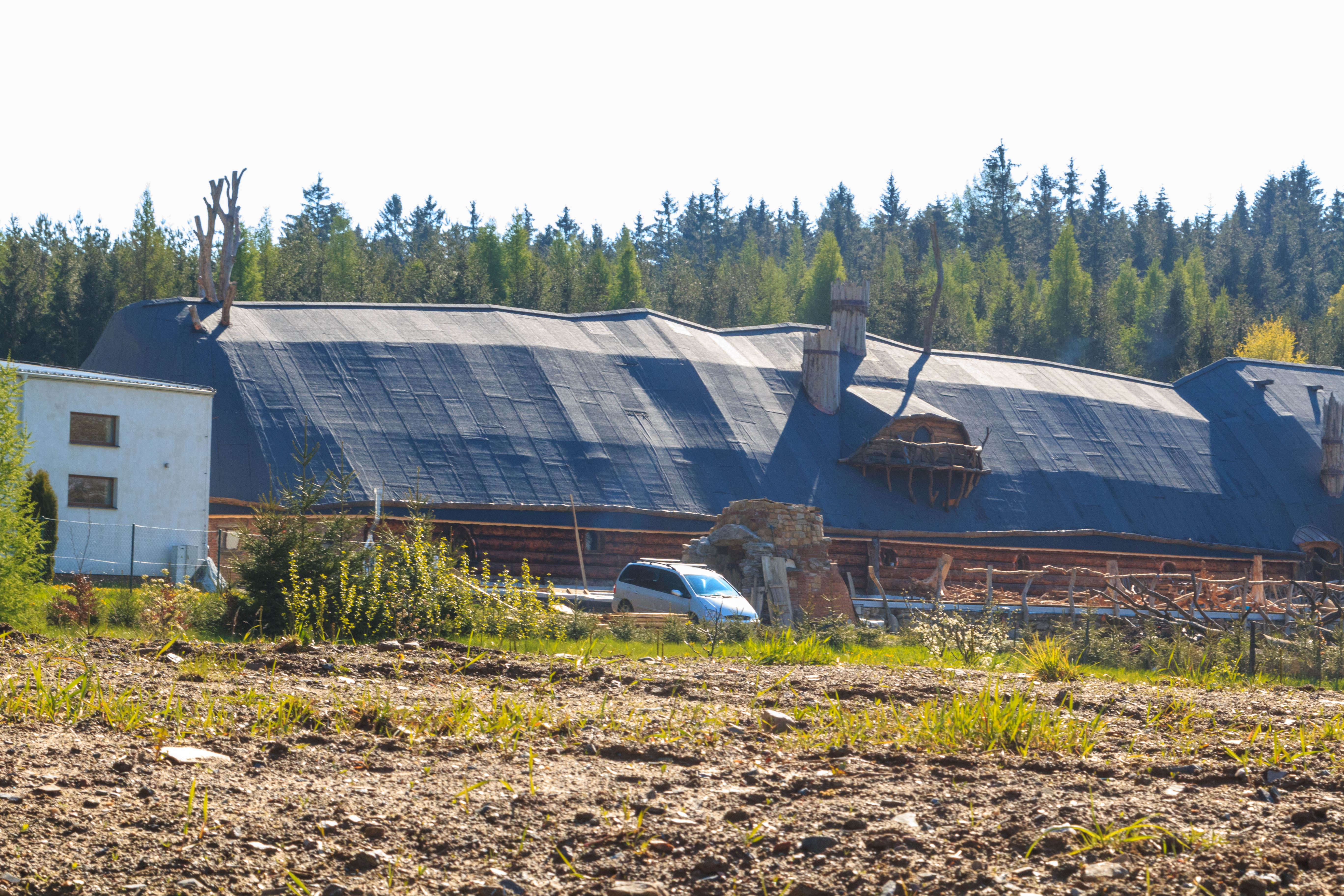 Medkovy kopce budova Pekla Project: Chráněná území.